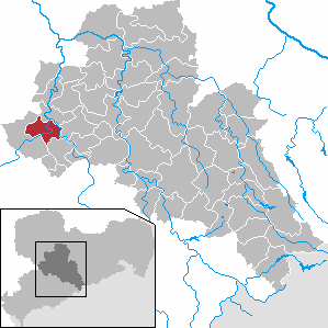 Lunzenau in Saxony - district Mittelsachsen